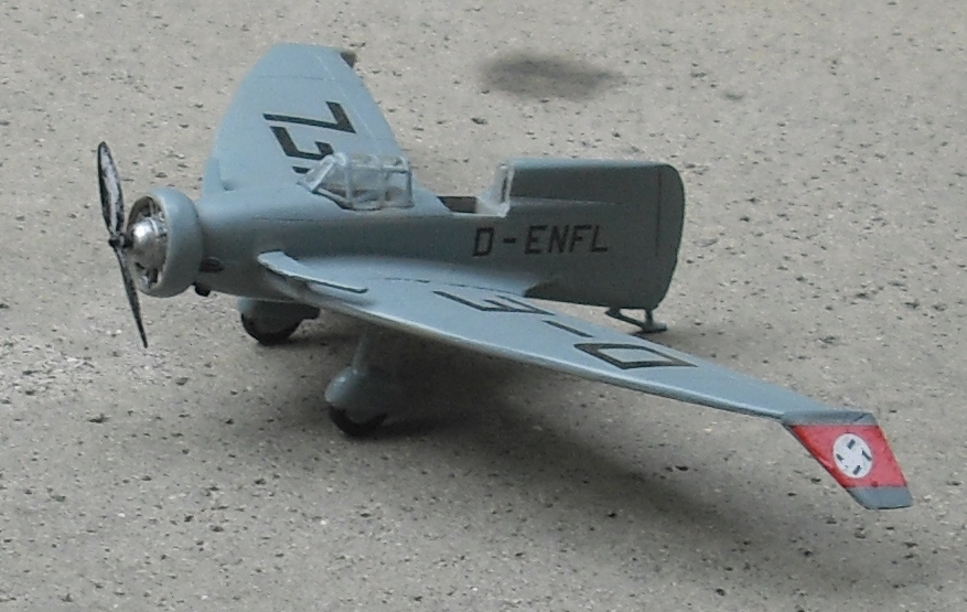 Modell der DFS39